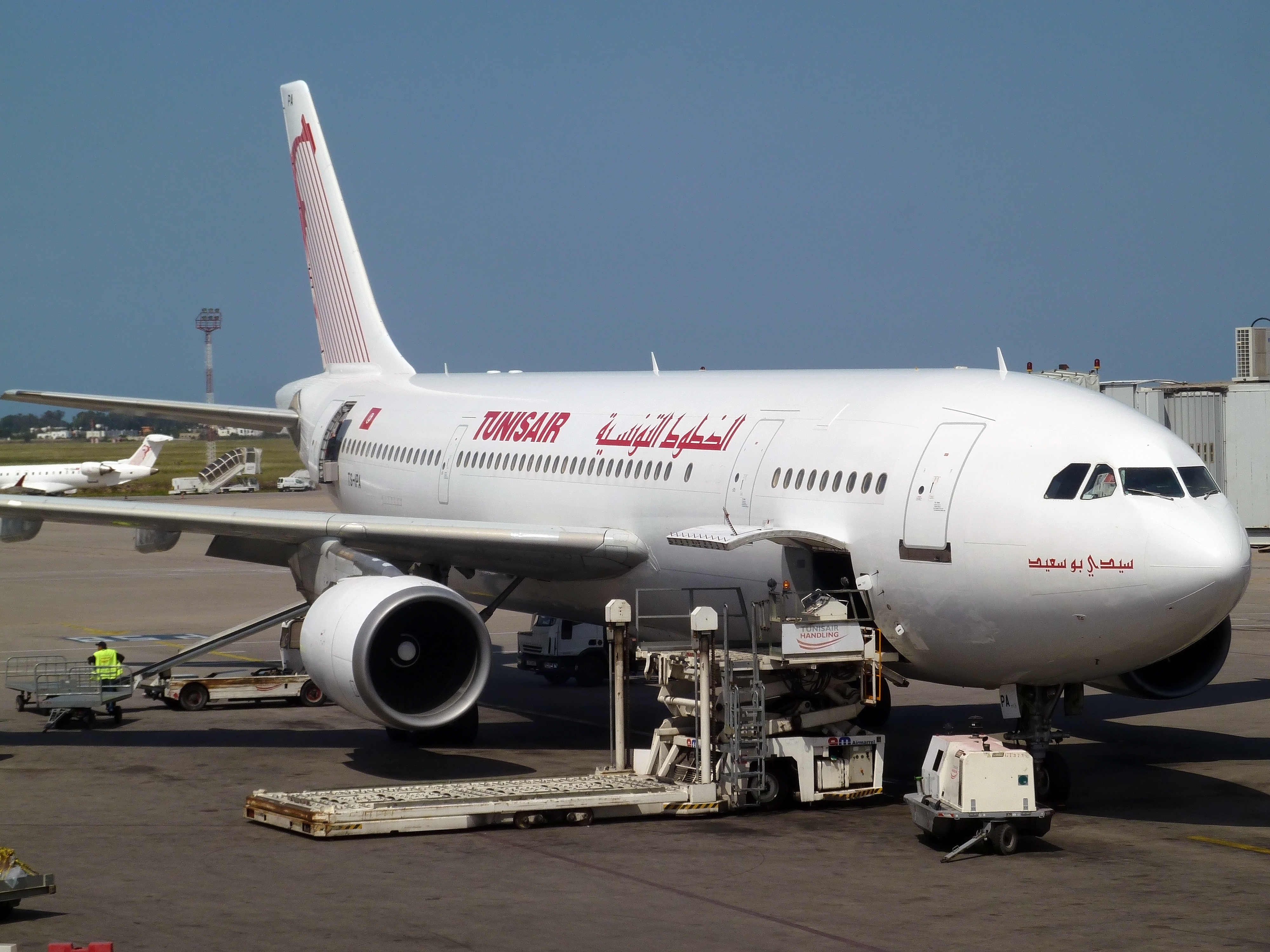 Airbus A300-600 intitulé Sidi Bou Said en stationnement sur l'aéroport Tunis Carthage